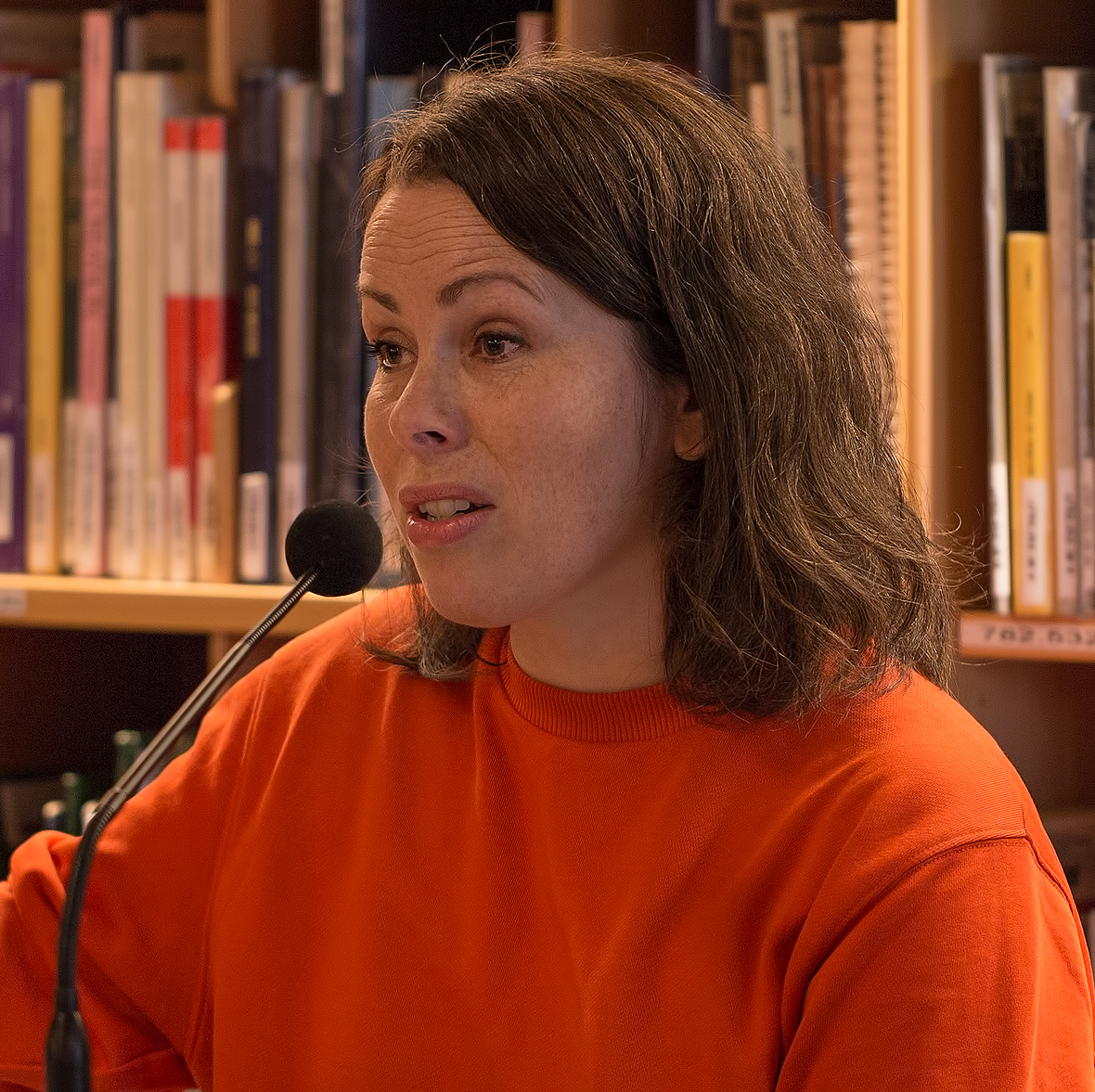 Litterær lunsj med Gunnhild Øyehaug